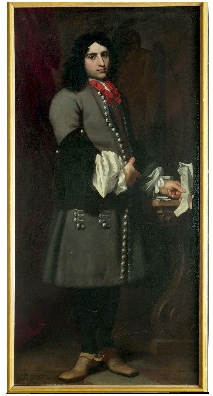 Ritratto di giovane elegante